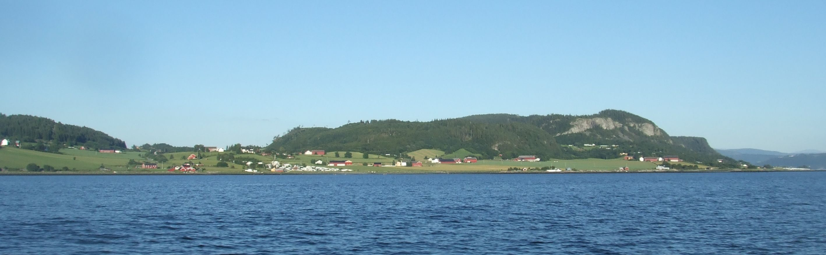 Norsk (bokmål): Store deler av Sørbygda på Skatval sett fra sjøen (Strindfjorden).